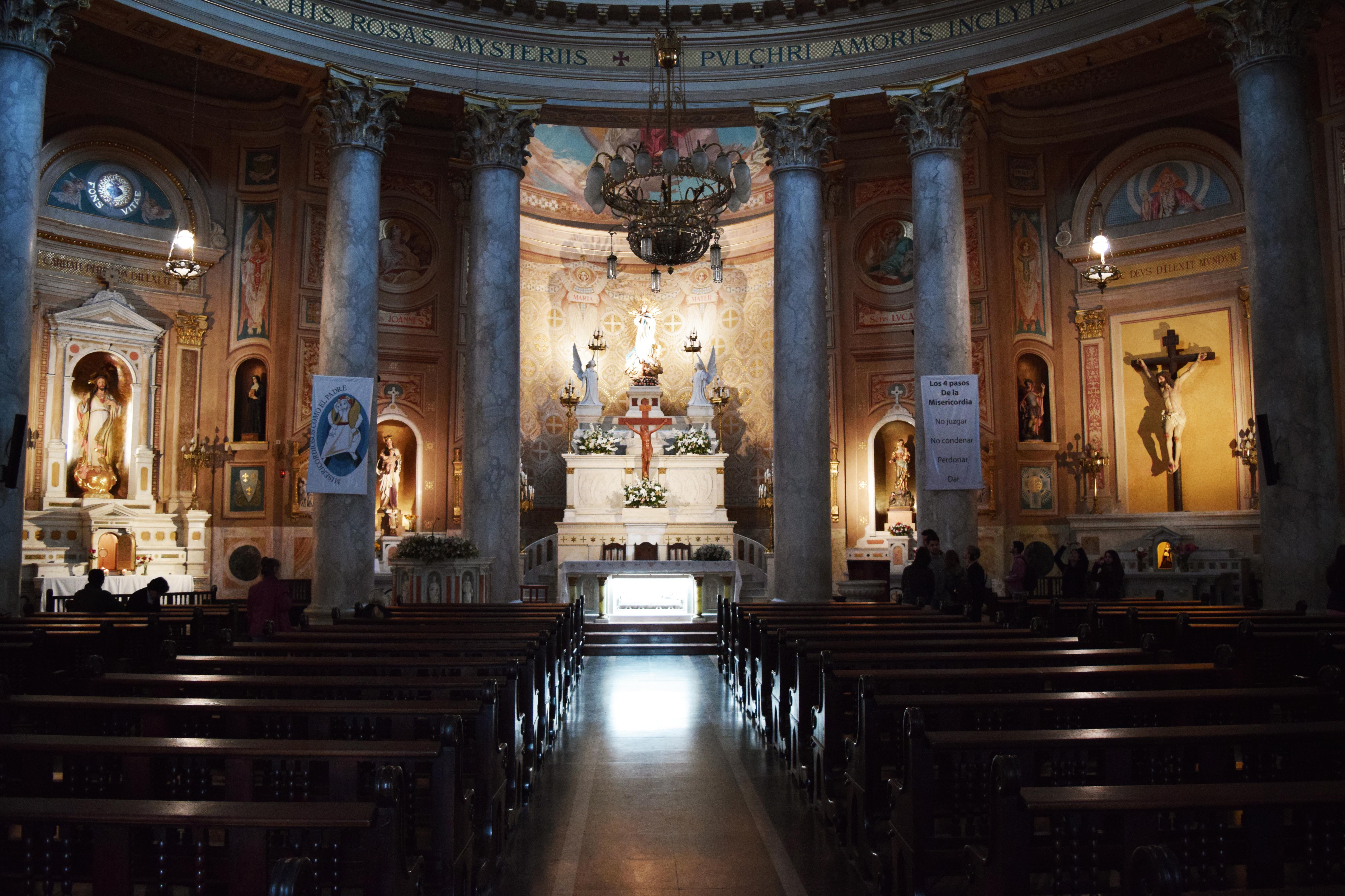 Vista desde el acceso principal.